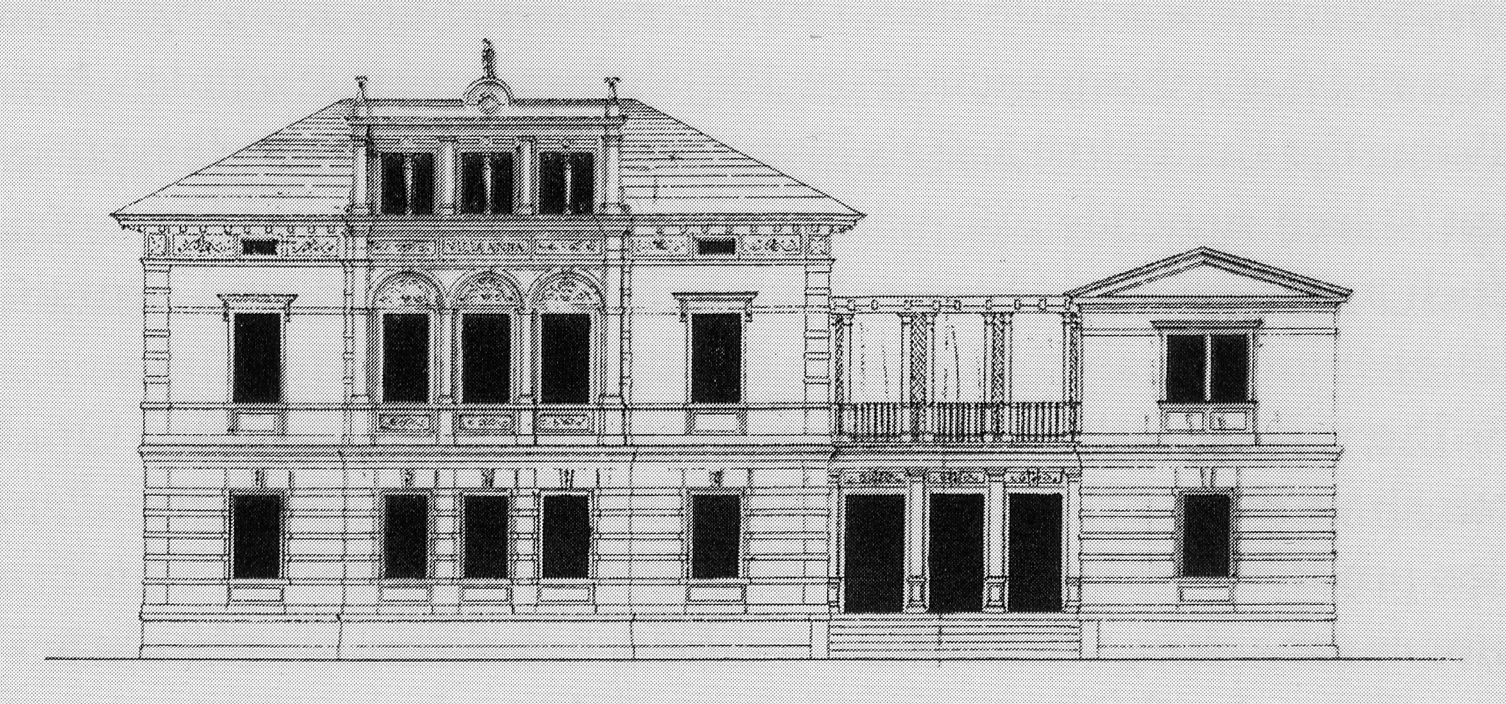 Radebeul, Katholisches Pfarramt Radebeul, „Römische Villa“ für Carl Christian Petzold, von der Gartenseite aus. Entwurf von 1876.